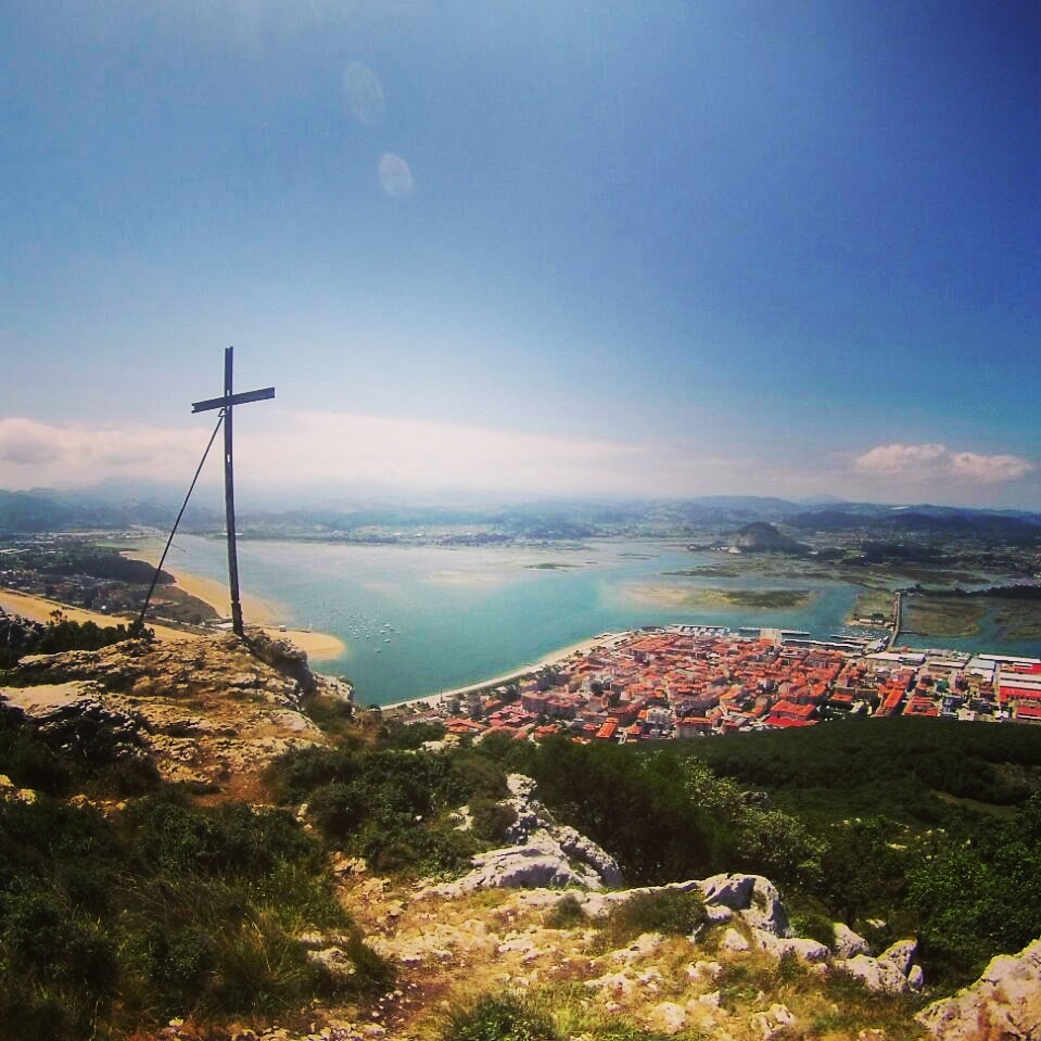 Vistas desde la Cruz, situada en lo alto del monte Buciero, en Santoña, Cantabria.